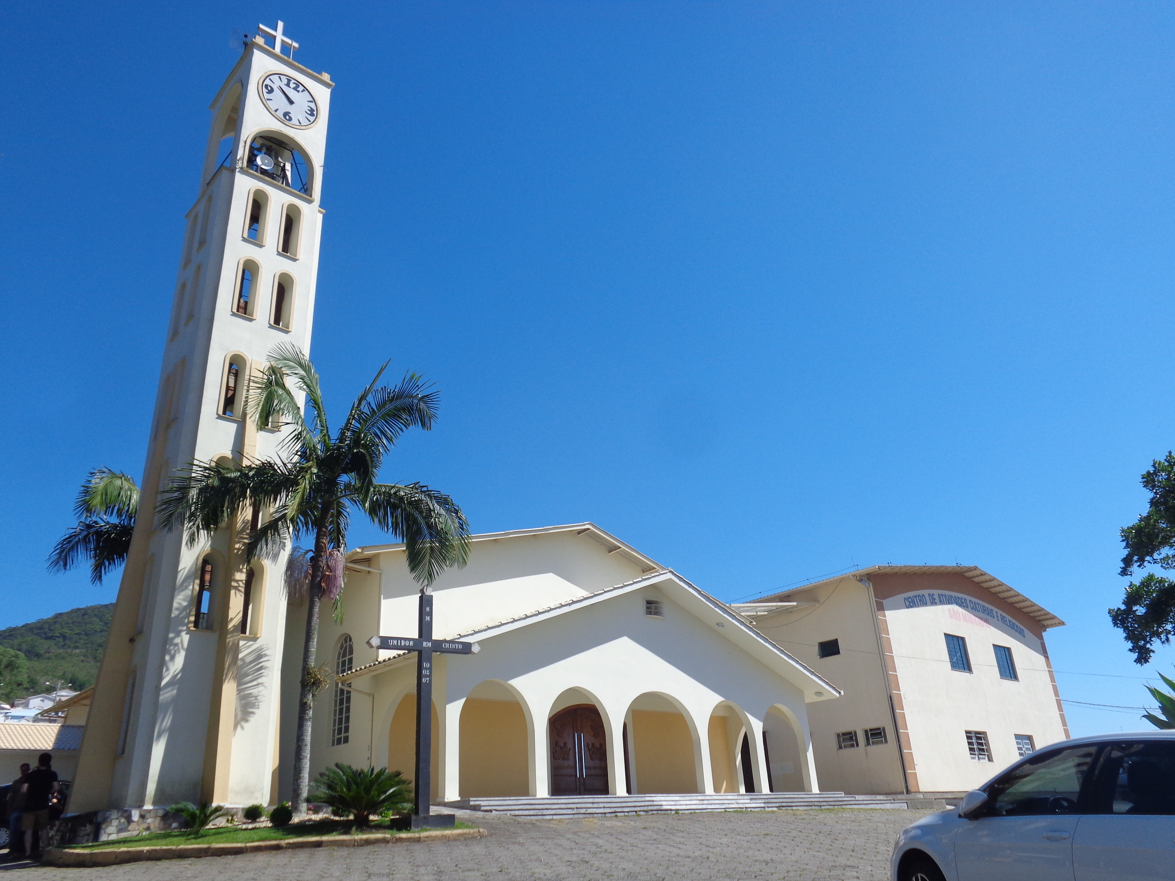 Igreja do Bairro São Martinho de Tubarão, Santa Catarina